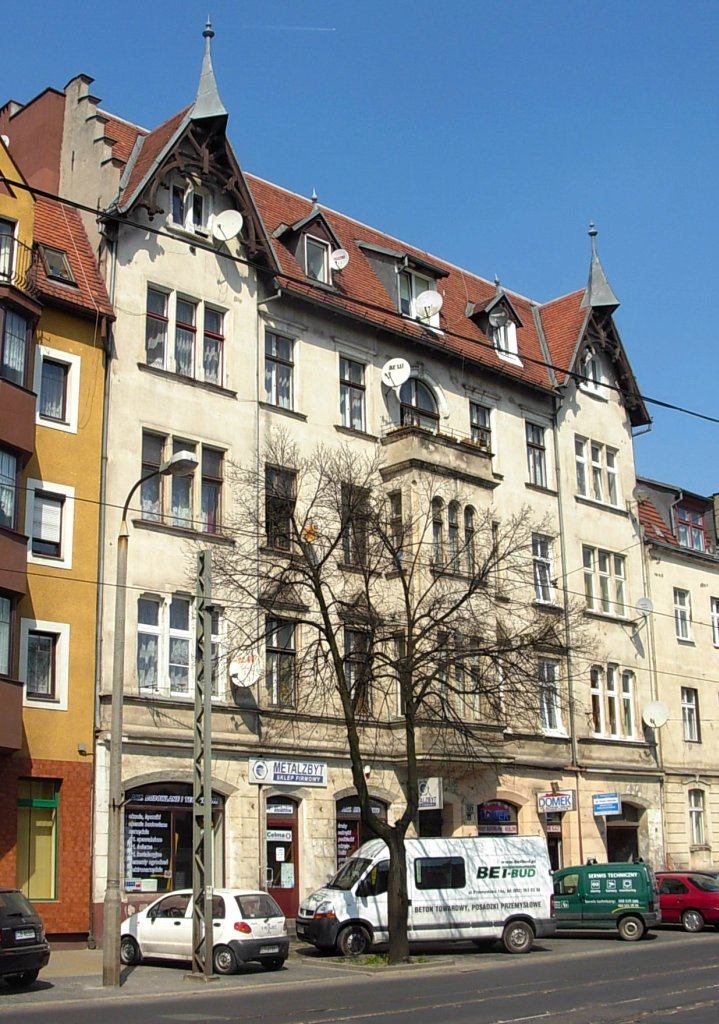 Kamienica ul. Gdańska 127 w Bydgoszczy